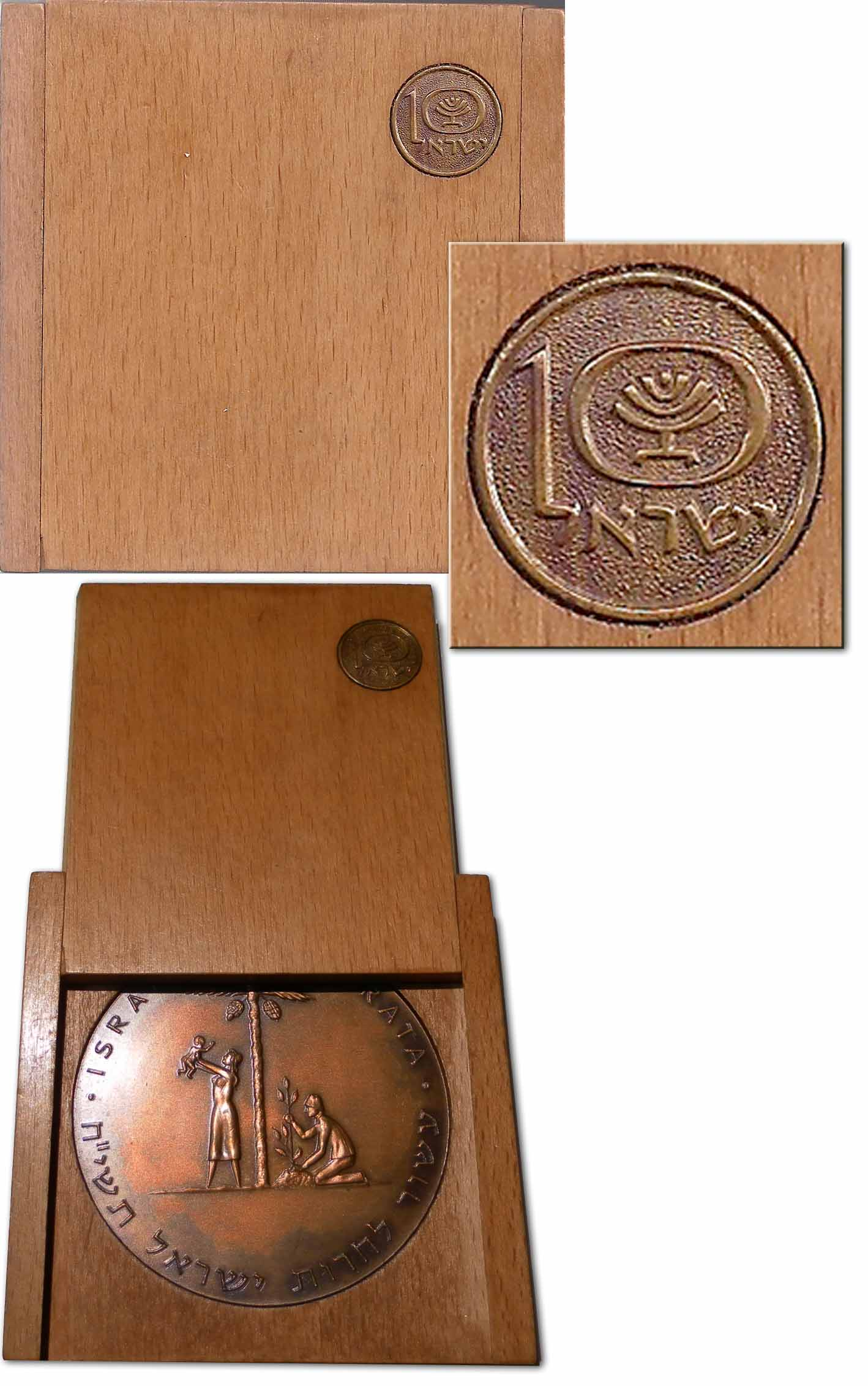 מדלית השיחרור, נחושת 61 מ"מ